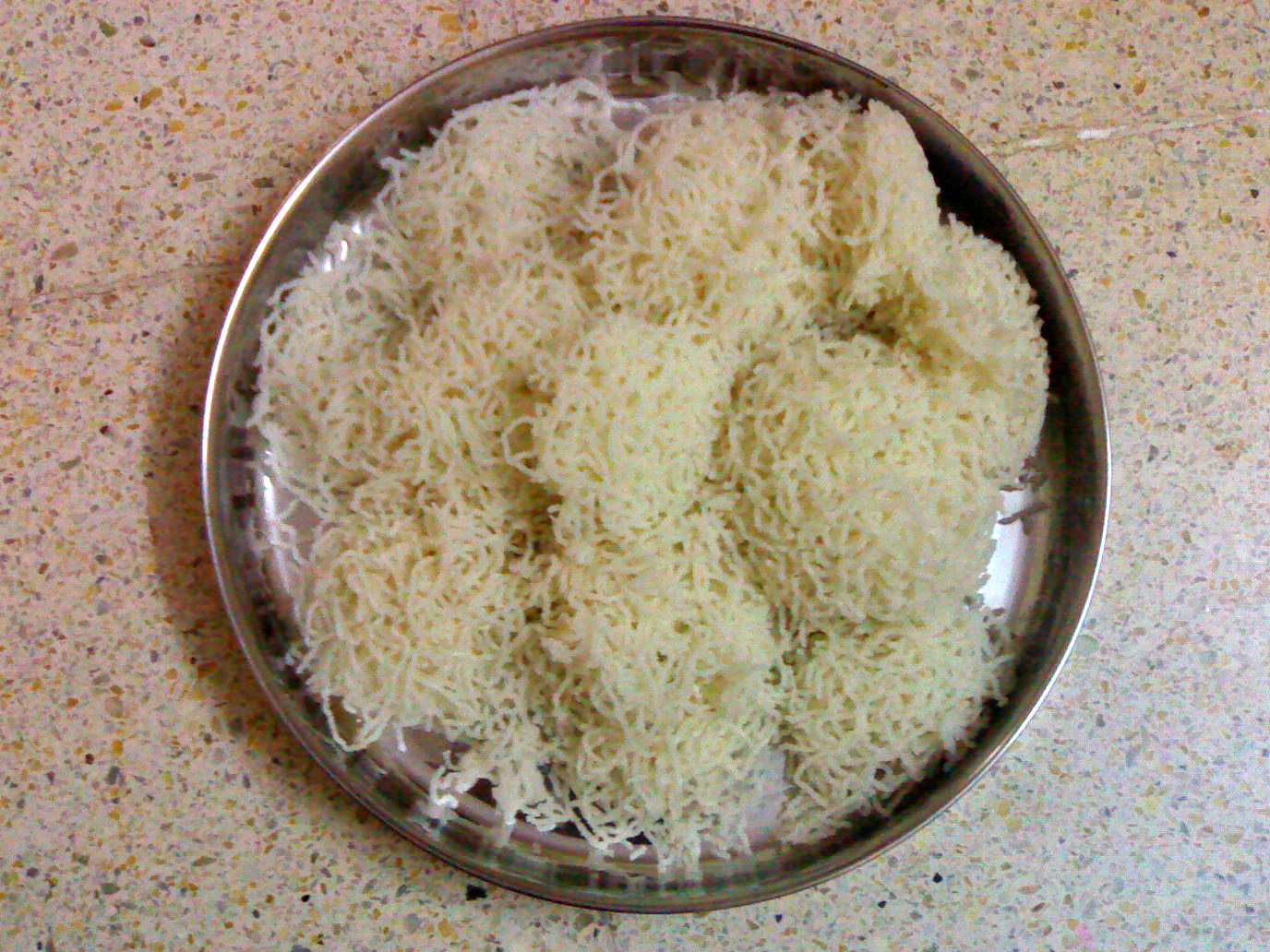 Idiyappam; See also: Image:IdiyappamMaking.ogg